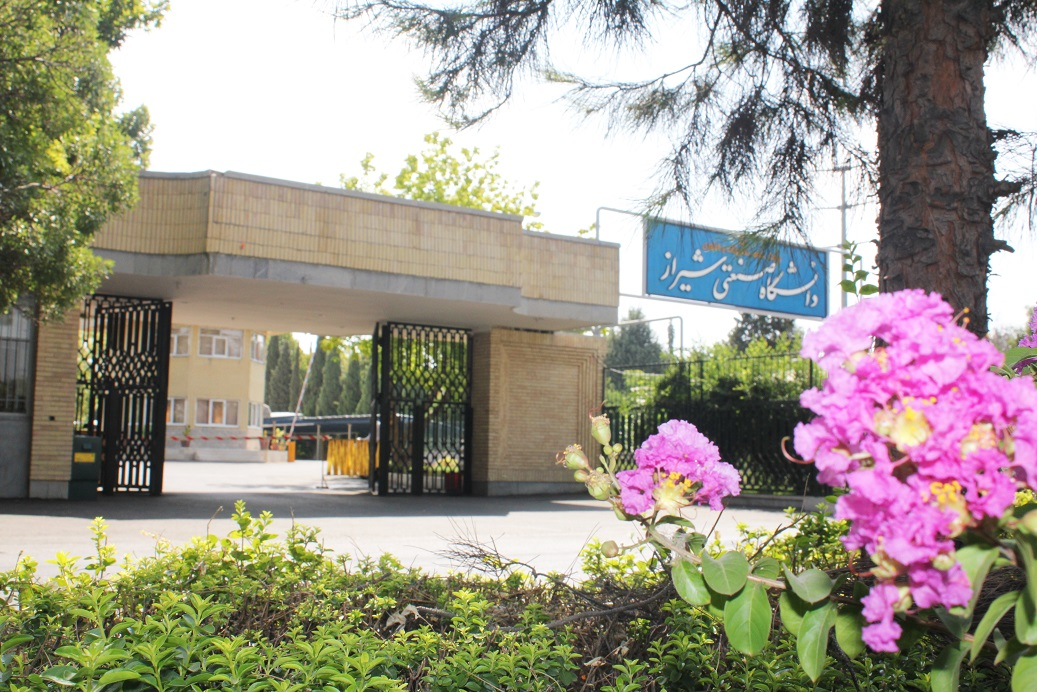 درب اصلی دانشگاه